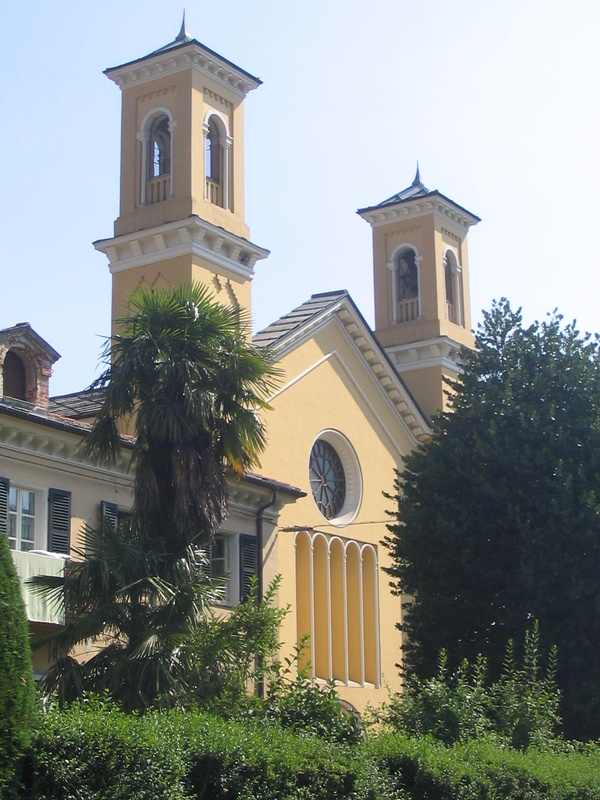 Kościół waldensów w Torre Pellice (Piemont, Włochy)